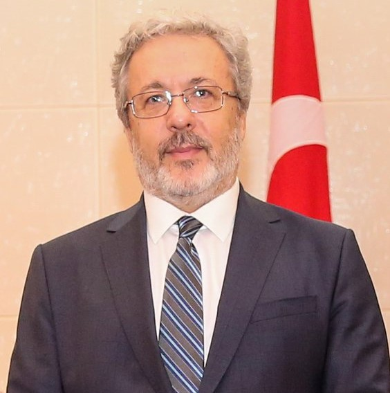 Mahmud Erol Kiliç bei der Übergabe seiner Akkreditierung als türkischer Botschafter in Osttimor